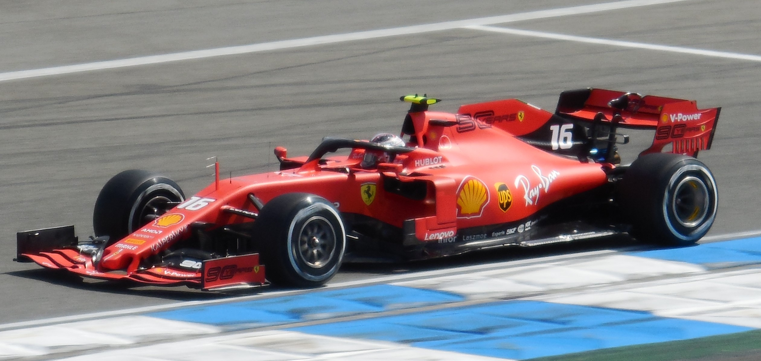 Charles Leclerc aux essais libre 3 à Hockenheim